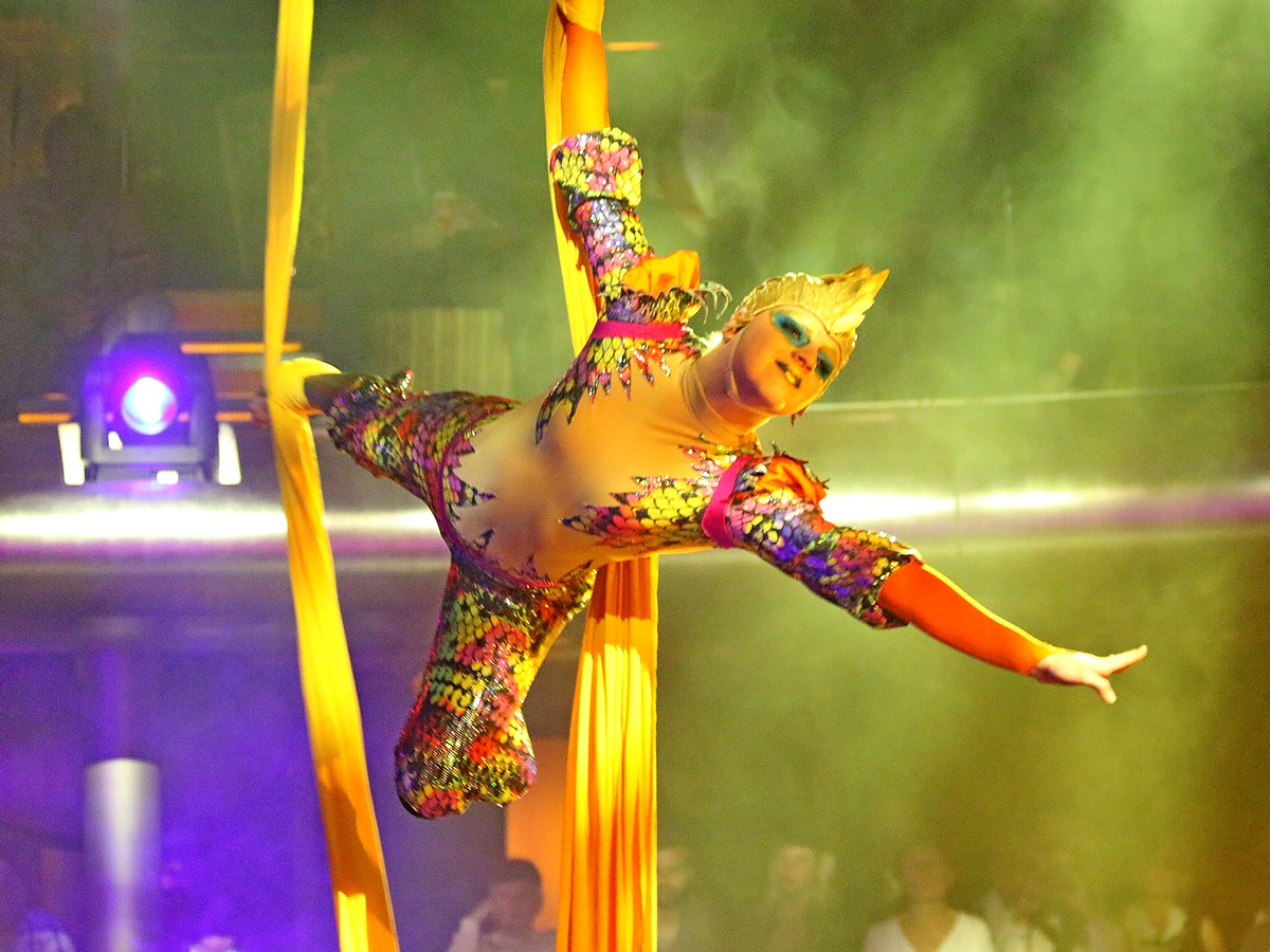 Luftakrobatik mit Tüchern auf der AIDAsol